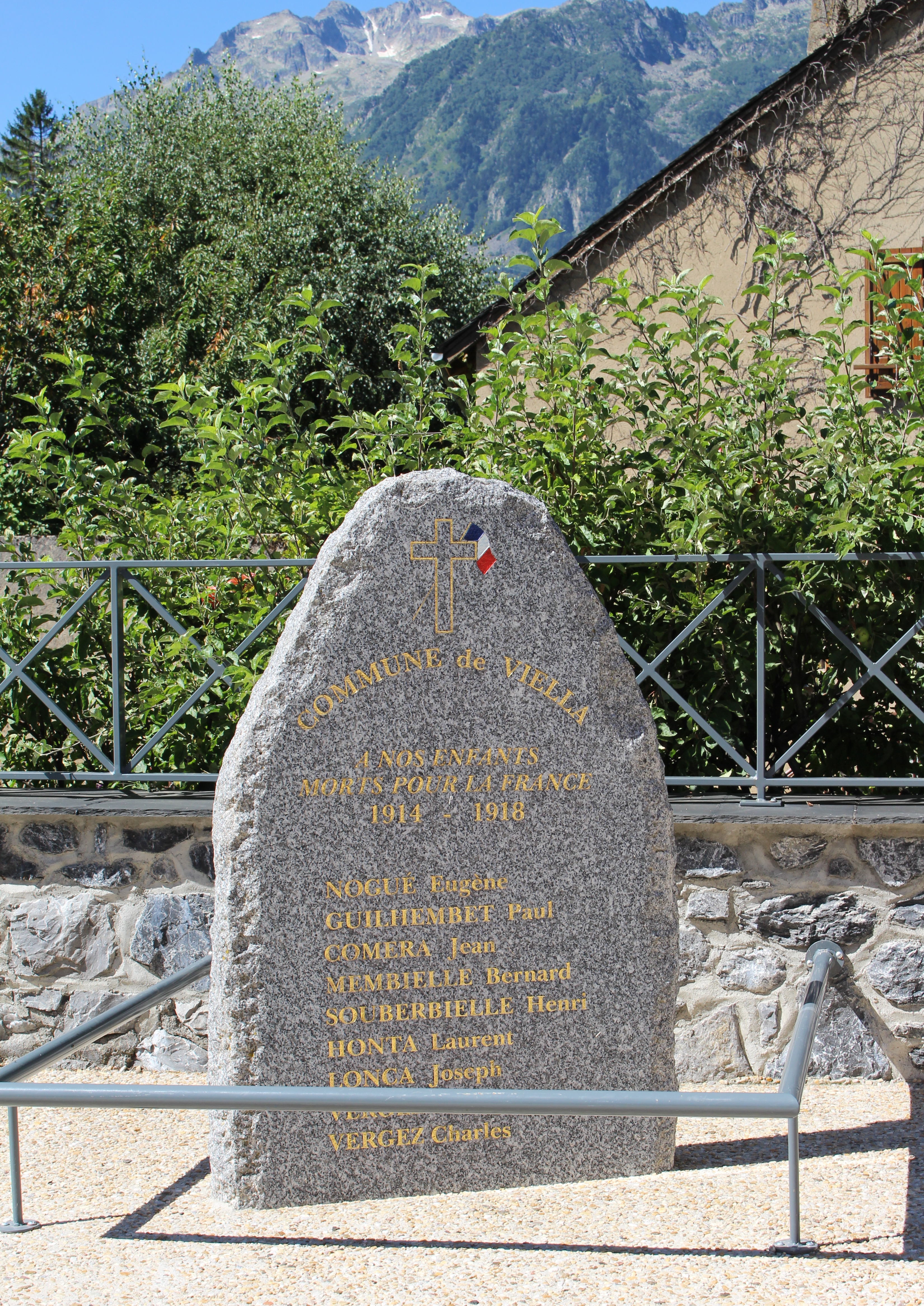 Monument aux morts de Viella (Hautes-Pyrénées)